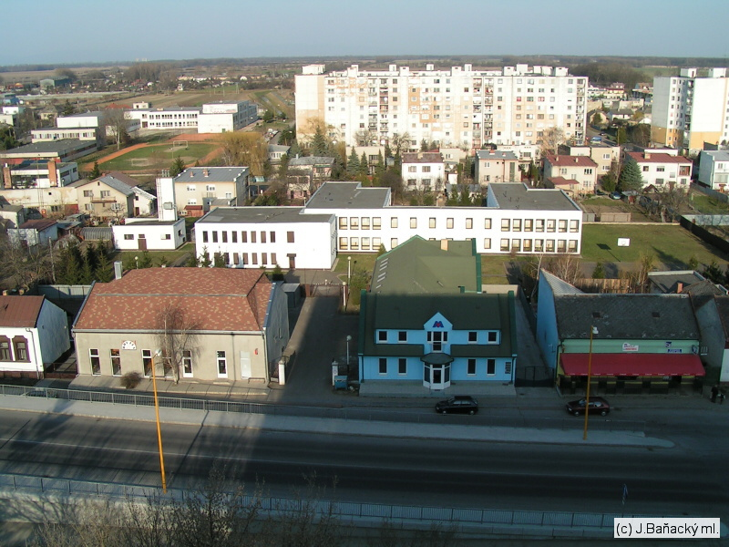 Cirkevné gymnázium, v pozadí časť sídliska Sever